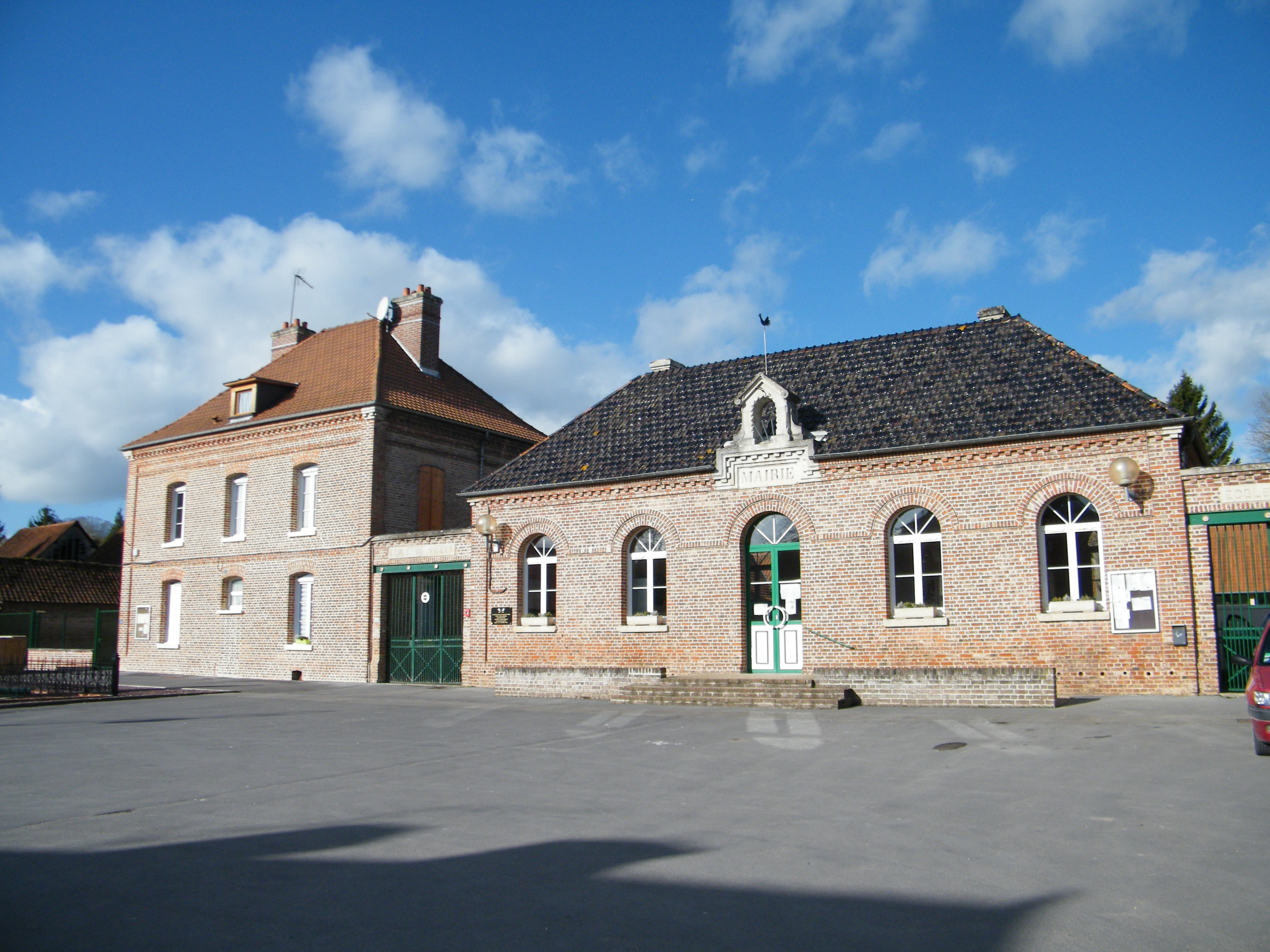 Allery, Somme, fr, mairie-école (3)